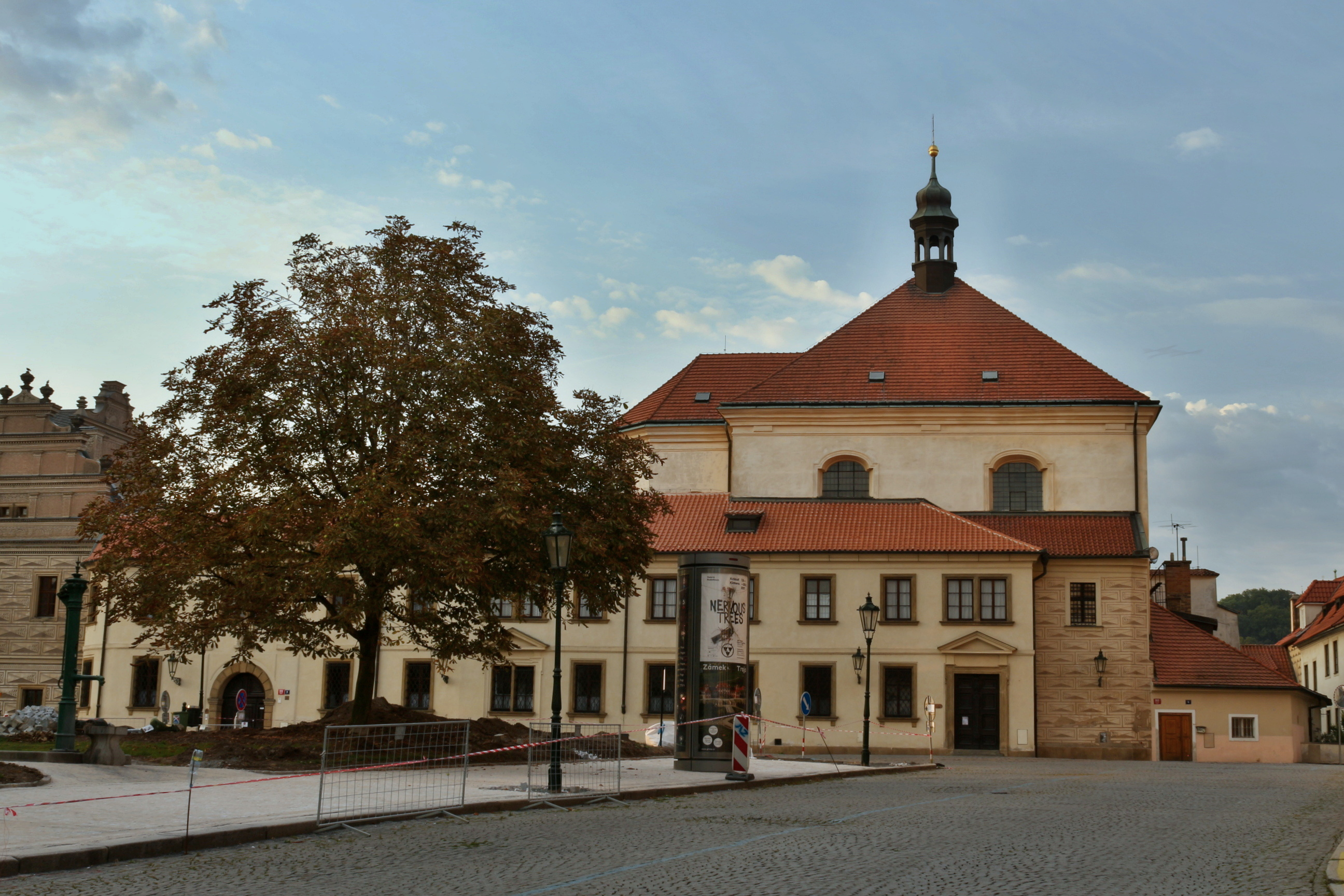 Klášter bosých karmelitánek s kostelem sv. Benedikta na Hradčanech v Praze